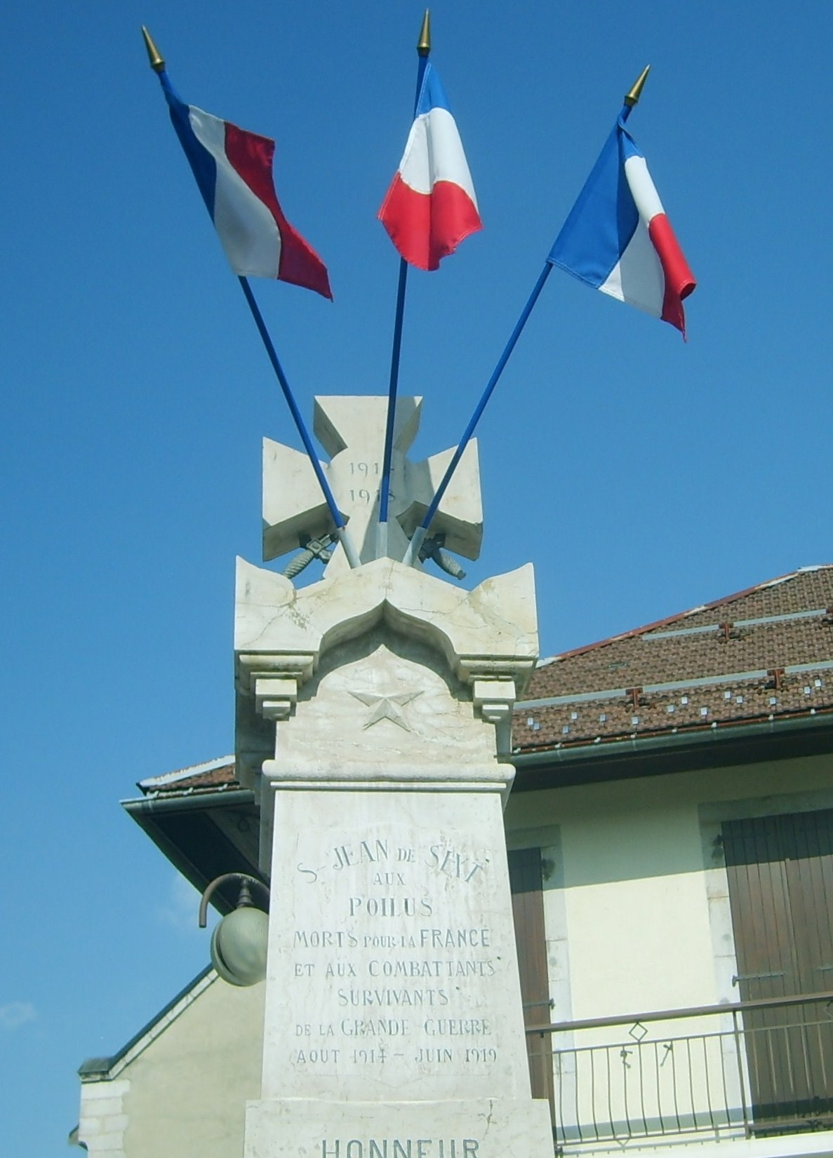 Monument aux morts 1914-1918 de Saint-Jean-de-Sixt : commune française, située dans le département de la Haute-Savoie et la région Rhône-Alpes, proche de la ville La Clusaz.